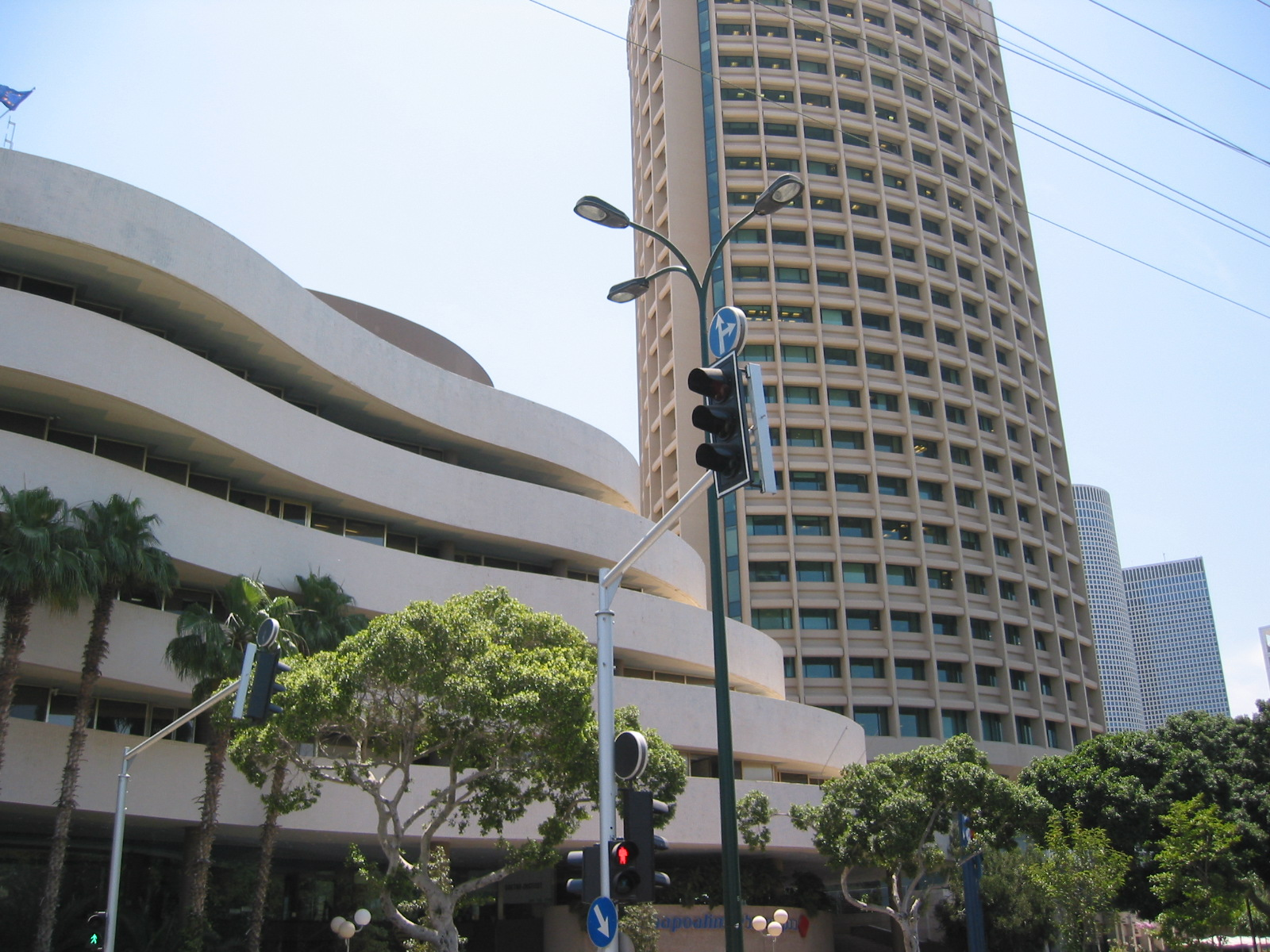 Asia House, Tel Aviv